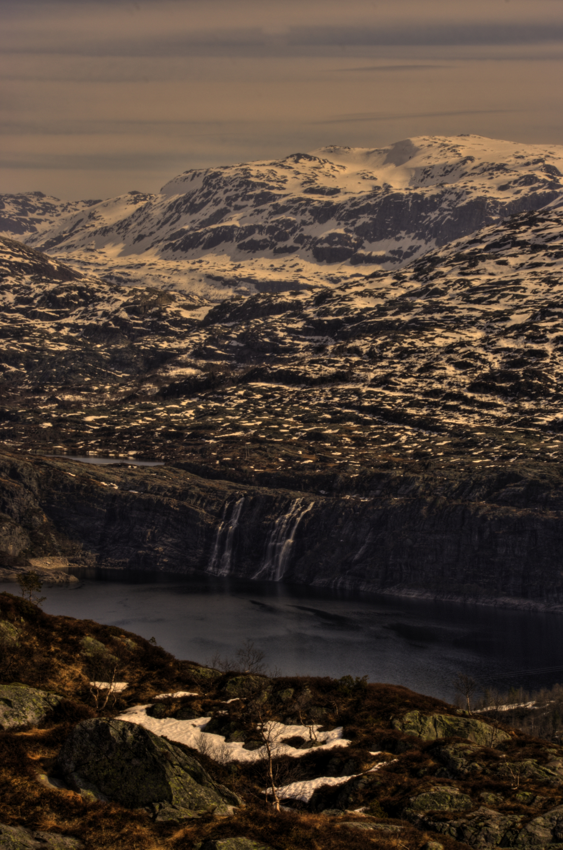 Sotafossane